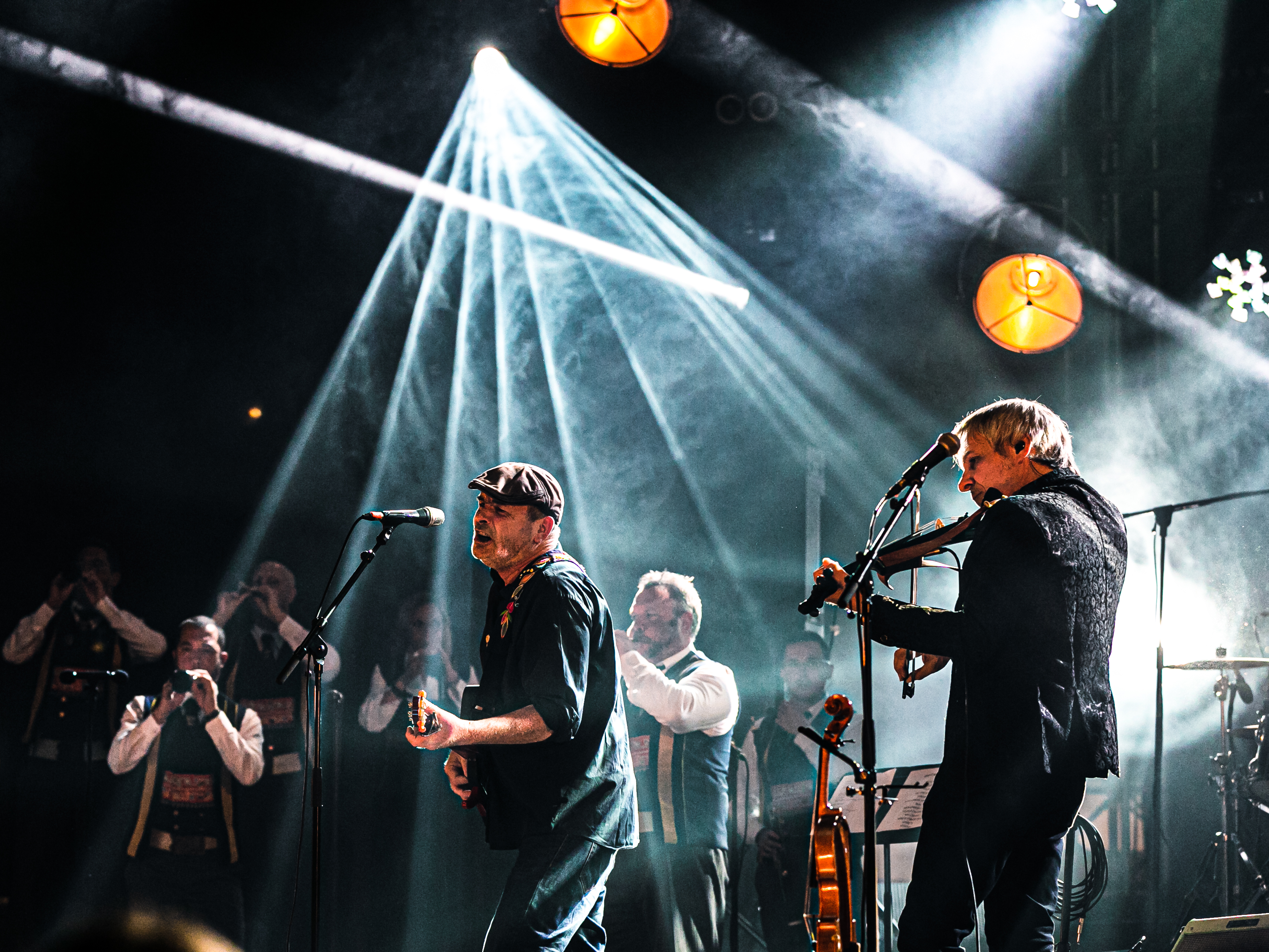 Création Nerzh du Bagad Kemper et Red Cardell qui célébrait les 70 ans du bagad dans le cadre du Festival Interceltique de Lorient, à l'Espace Marine, le 9 août 2019.